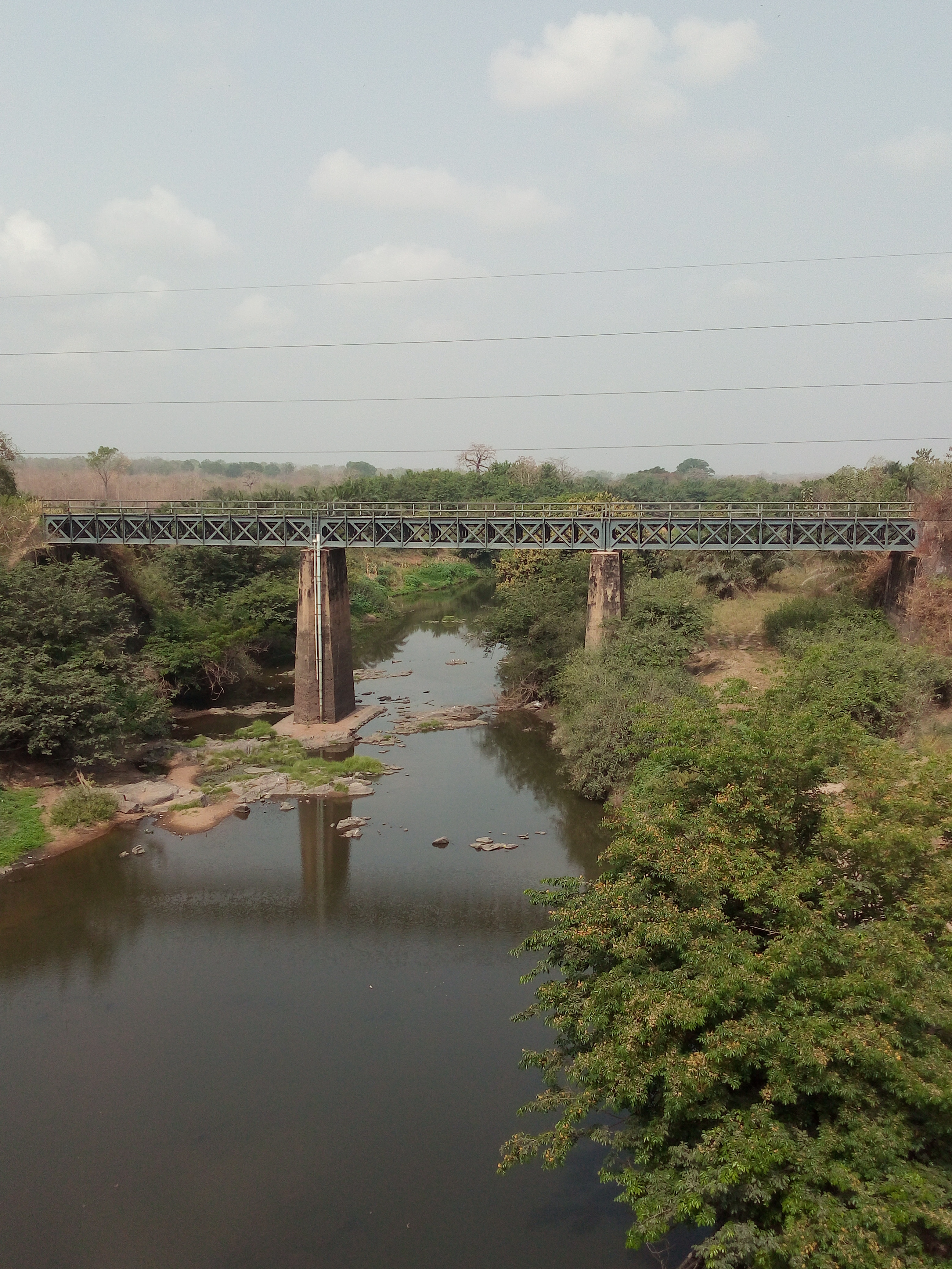 Français cadien: Ce pont permet le passage des train de l'OCBN (Organisation commune Bénin-Niger) en direction du Niger traversant le fleuve zou sur le tronçon Bohicon Dassa This is an image with the theme "Africa on the Move or Transport" from: Benin